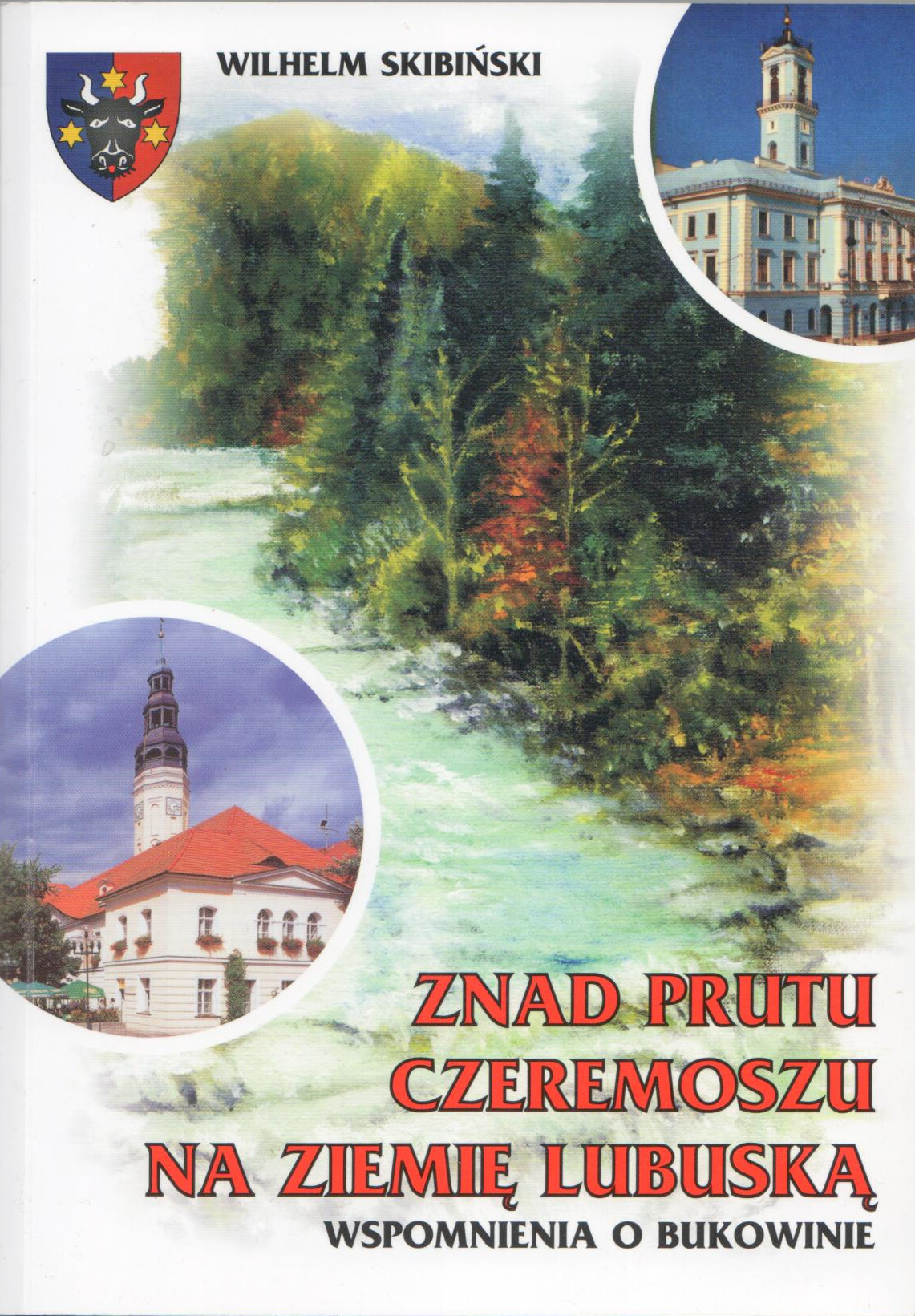 W. Skibiński, Znad Prutu Czeremoszu na Ziemię Lubuską - wspomnienia o Bukowinie, Zielona Góra 2014.